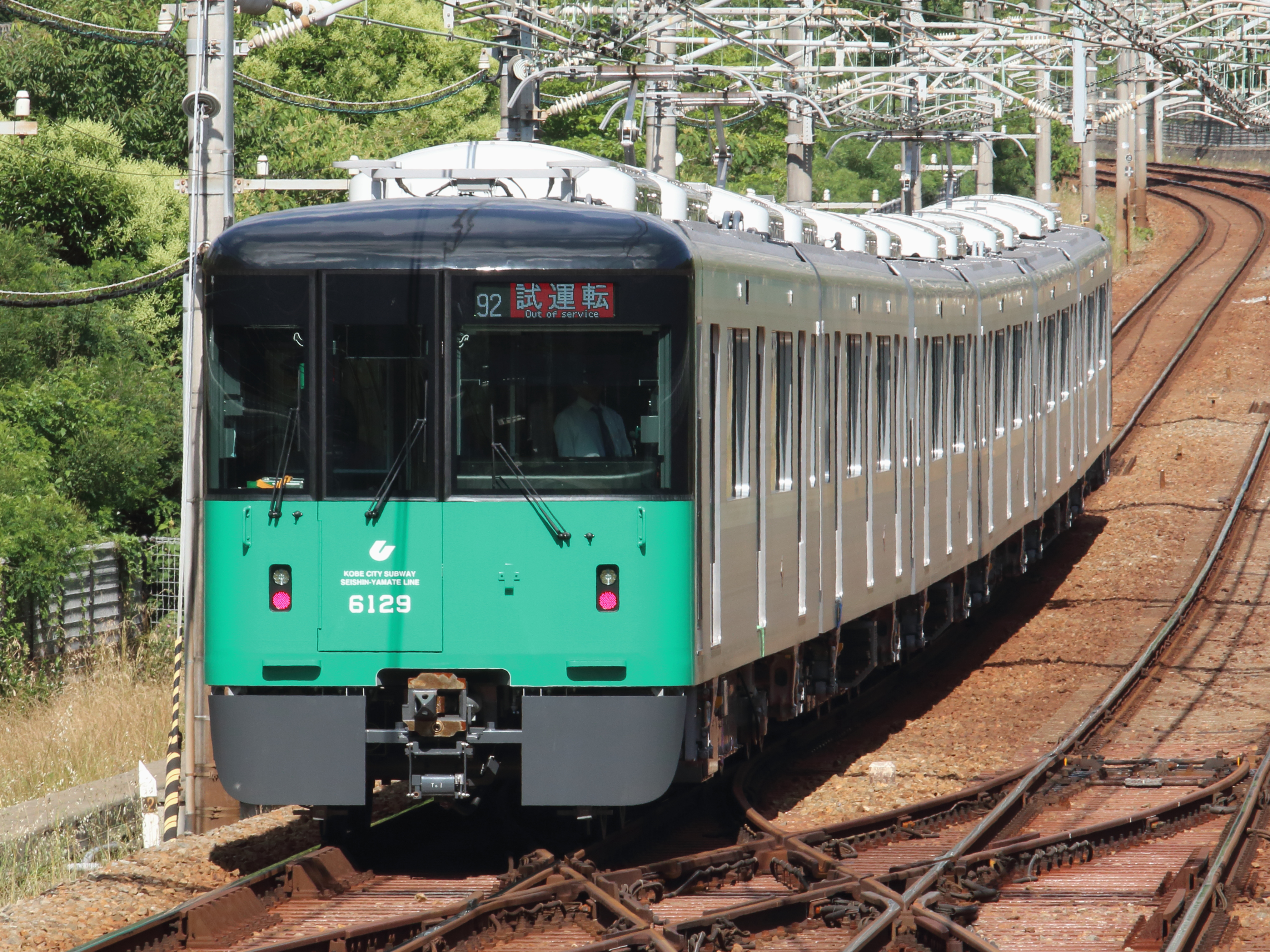 神戸市営地下鉄6000形 学園都市駅にて。